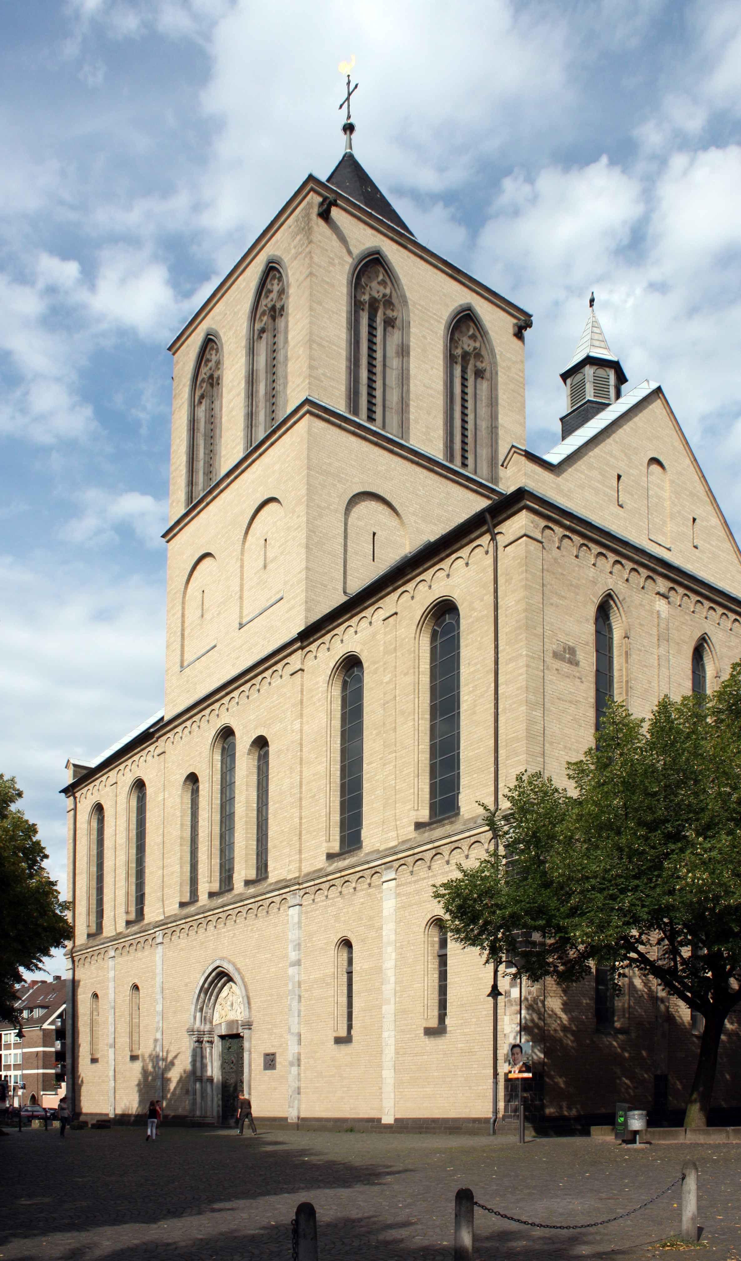 St. Kunibert Kirche, Köln